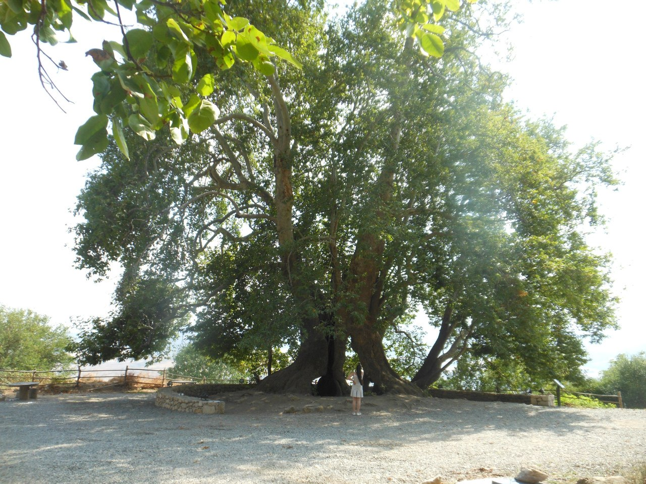 Нагорный Карабах